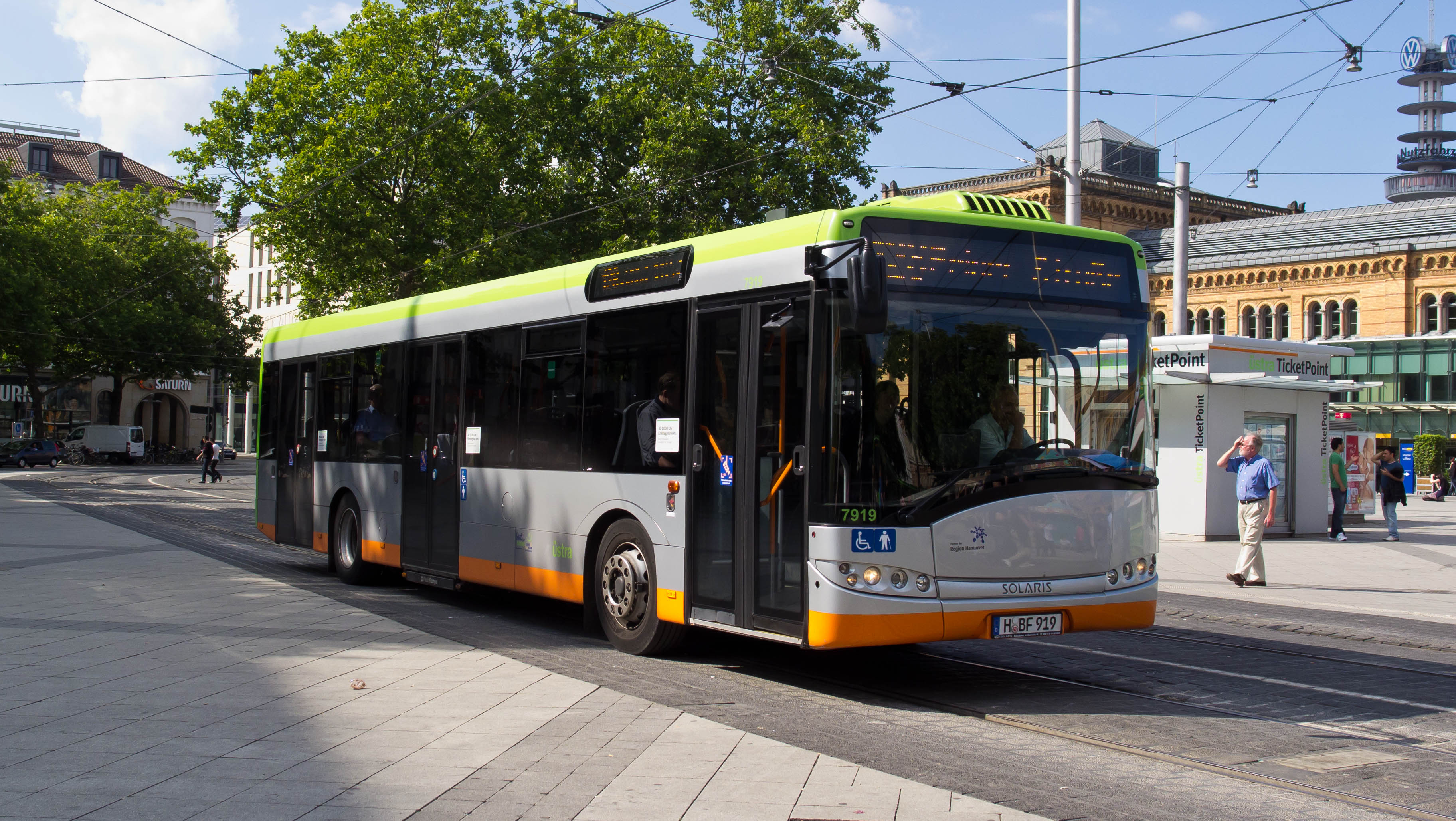 Solaris Urbino 12 der Üstra, Hannover Ernst-August-Platz